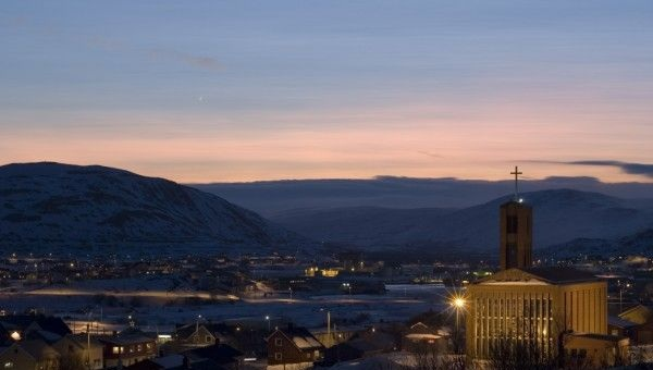 Båtsfjord, Inge Wahl,31/12/05,Inge Wahl